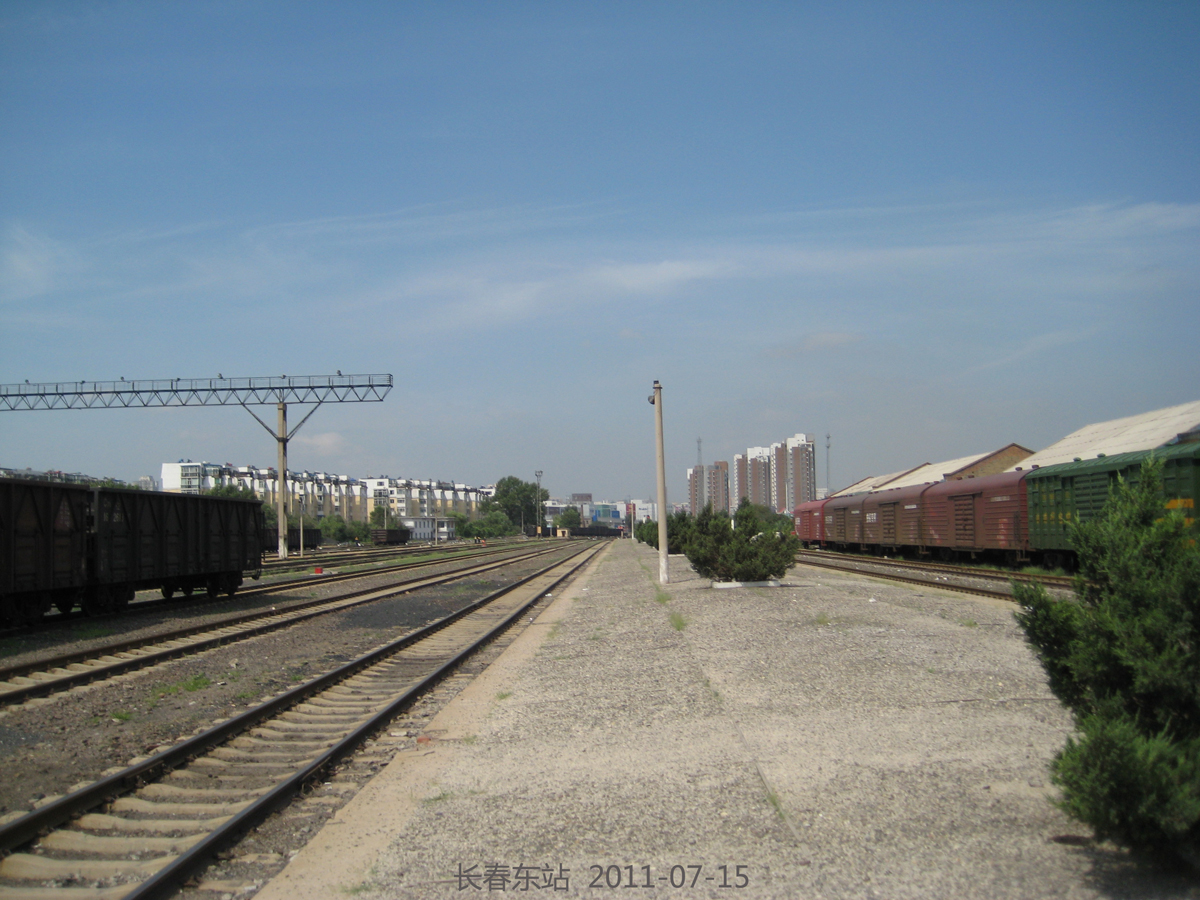 长春东站 Changchun Dongzhan